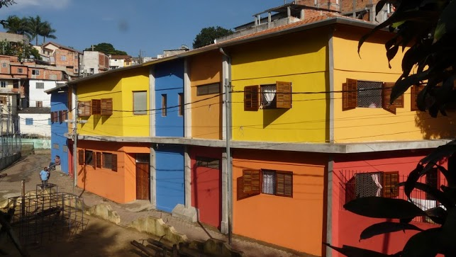 Das neue Kindergartengebäude mit 10 Kindergartengruppe und ernährungsbewusster Küche.